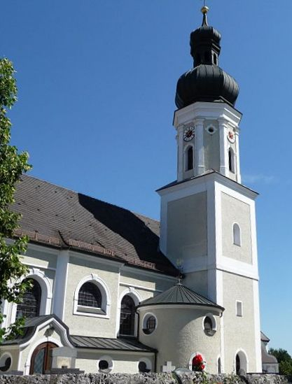 Die katholische Pfarrkirche St. Martin von Kirchham